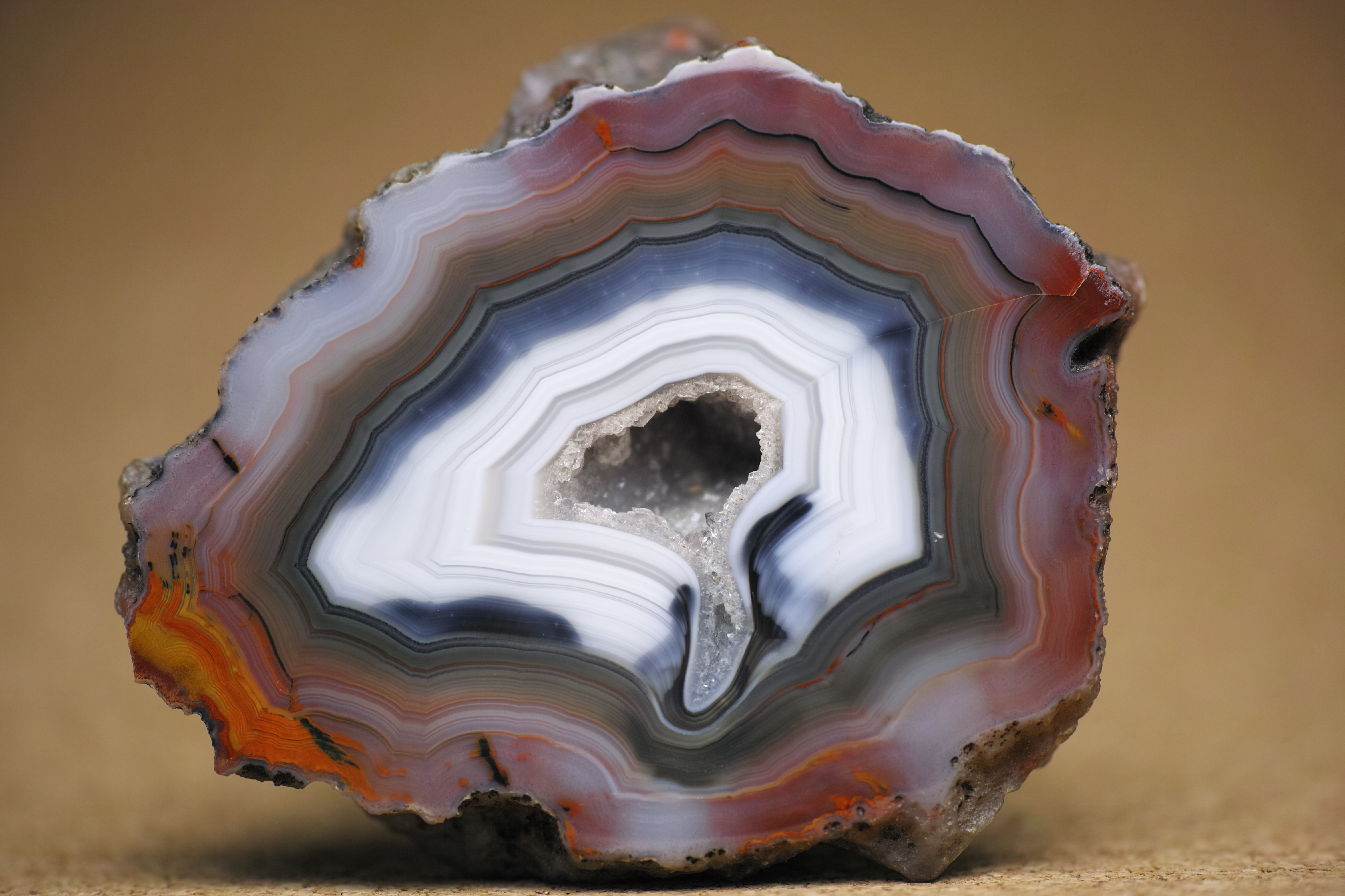 Condor Agate from near San Rafael, Mendoza, Argentina